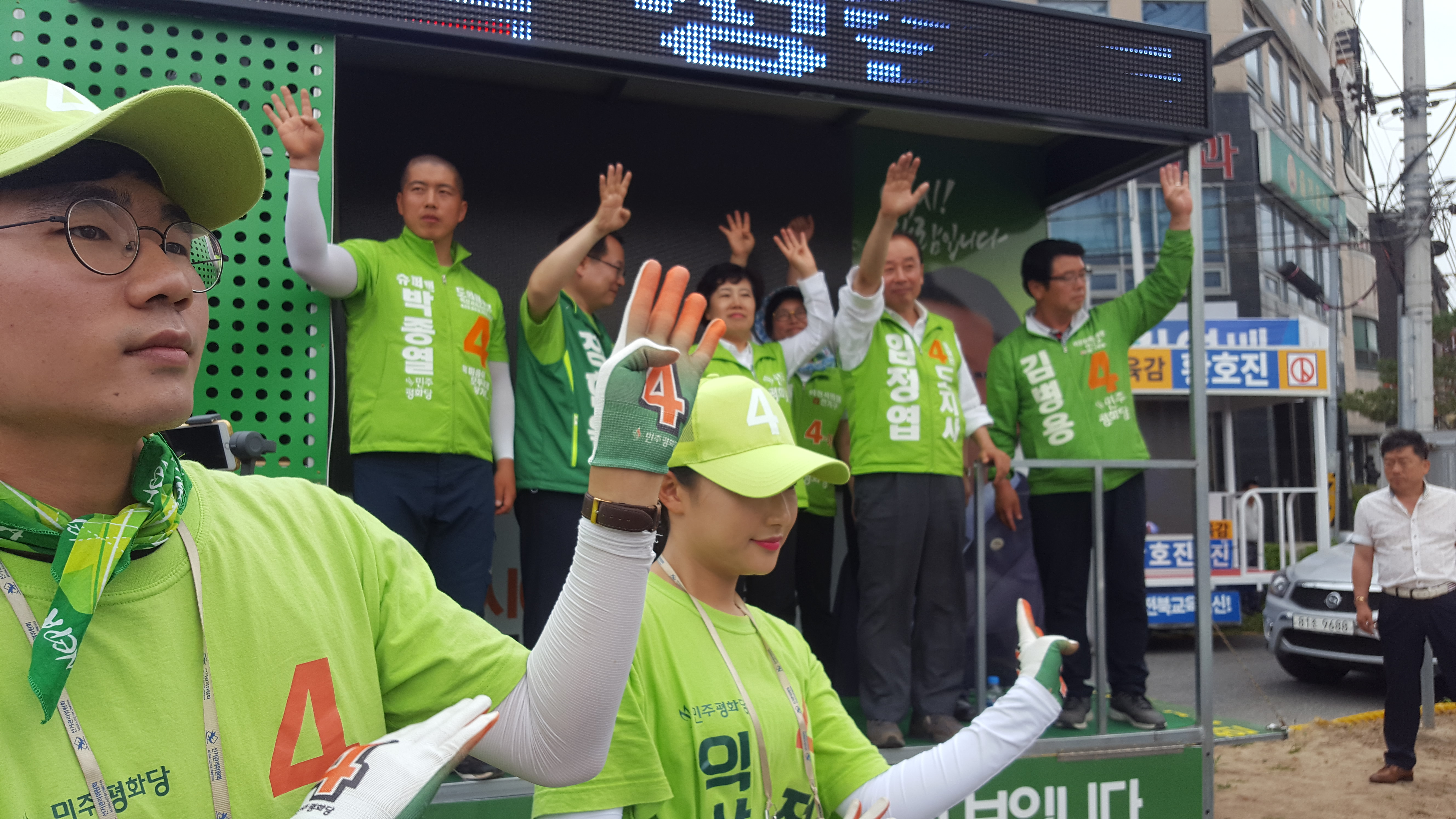 전라북도 익산시 남중동 북부시장사거리에서 합동유세 중인 박종열 익산시제4선거구 전라북도 광역의원 후보, 정헌율 익산시장 후보, 조배숙 민주평화당 대표, 김유순 익산시 라선거구 기초의회의원 후보, 임정엽 전라북도 광역자치단체장 후보, 김병용 익산시 아선거구 기초의회의원 후보와 함께 선거운동원이 기호 4번을 손으로 표시하며 지지를 호소하고 있다.